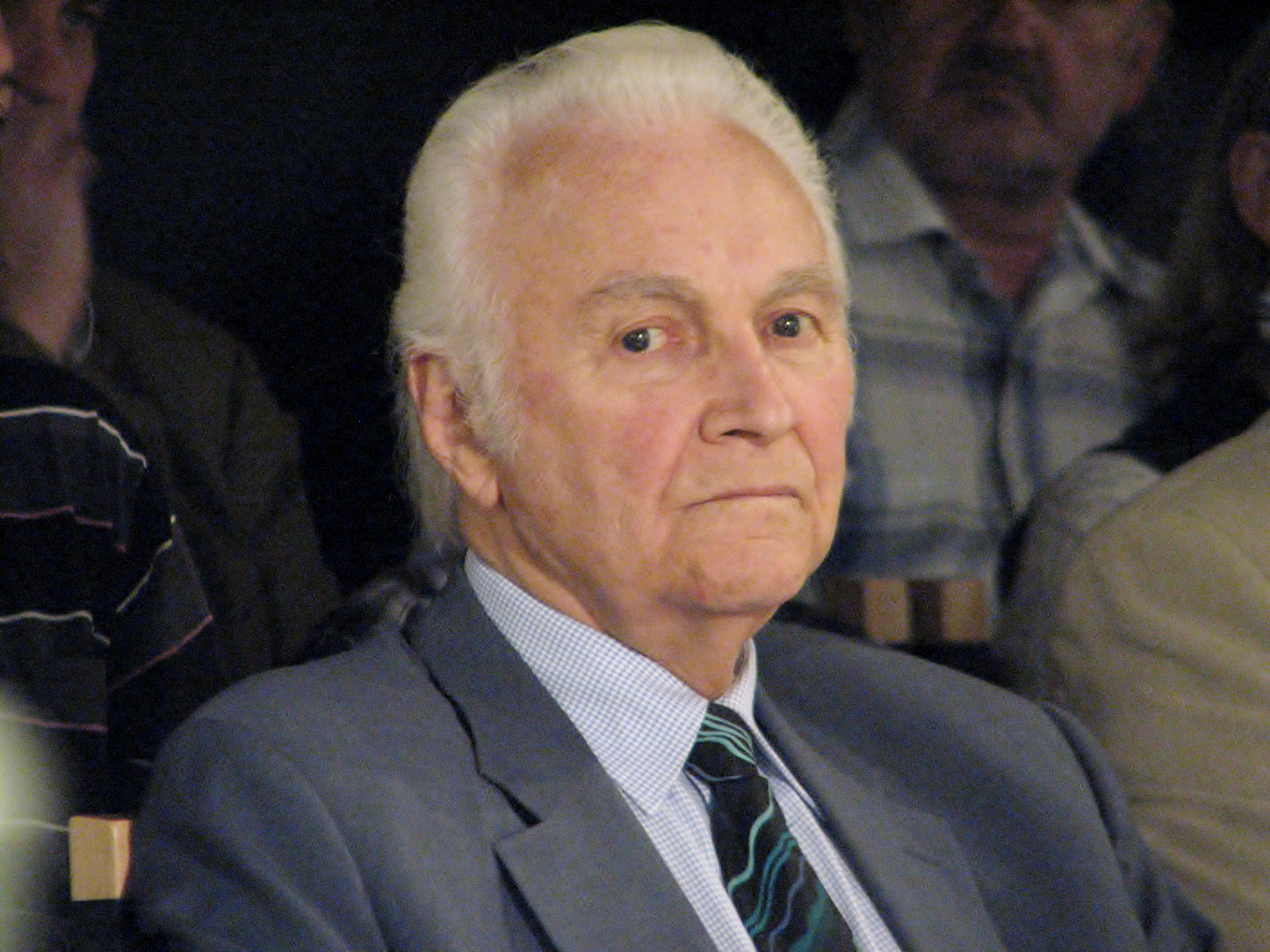 Arnold Rüütel Mart Helme raamatu "Poliitikast ja sõjast" esitlusel Solarise keskuse Apollos